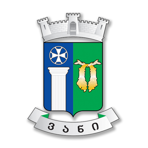 ვანის მუნიციპალიტეტის გერბი